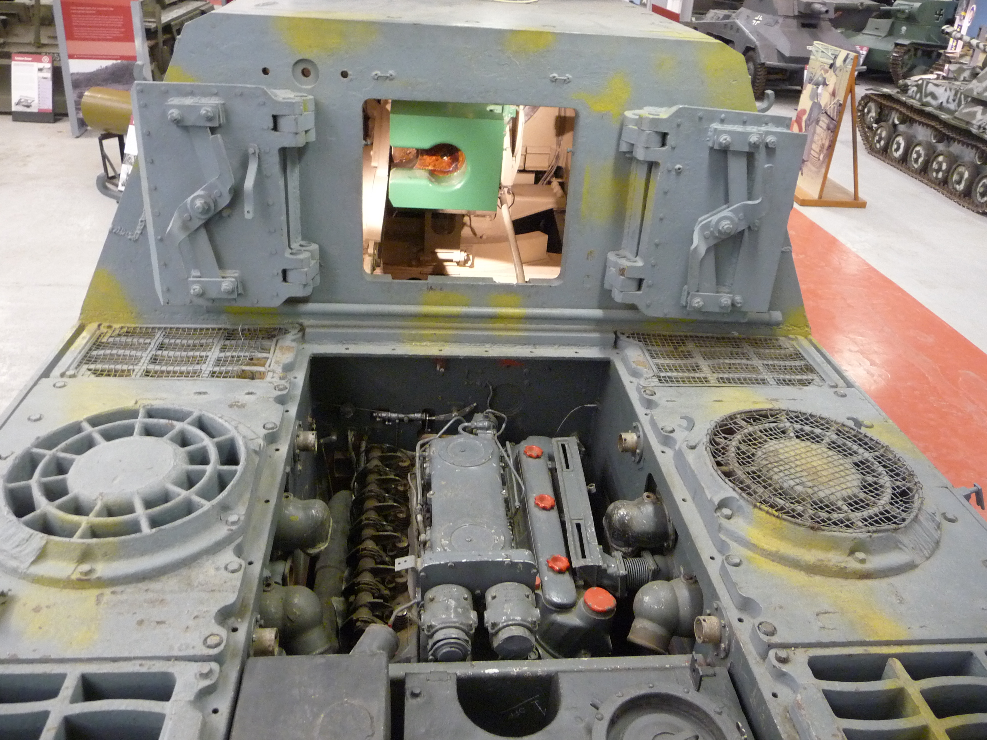 Motorraum eines Sd Kfz 186 Jagdtiger im Panzermuseum Bovington.